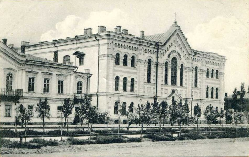 Новочеркасск, Духовная семнария